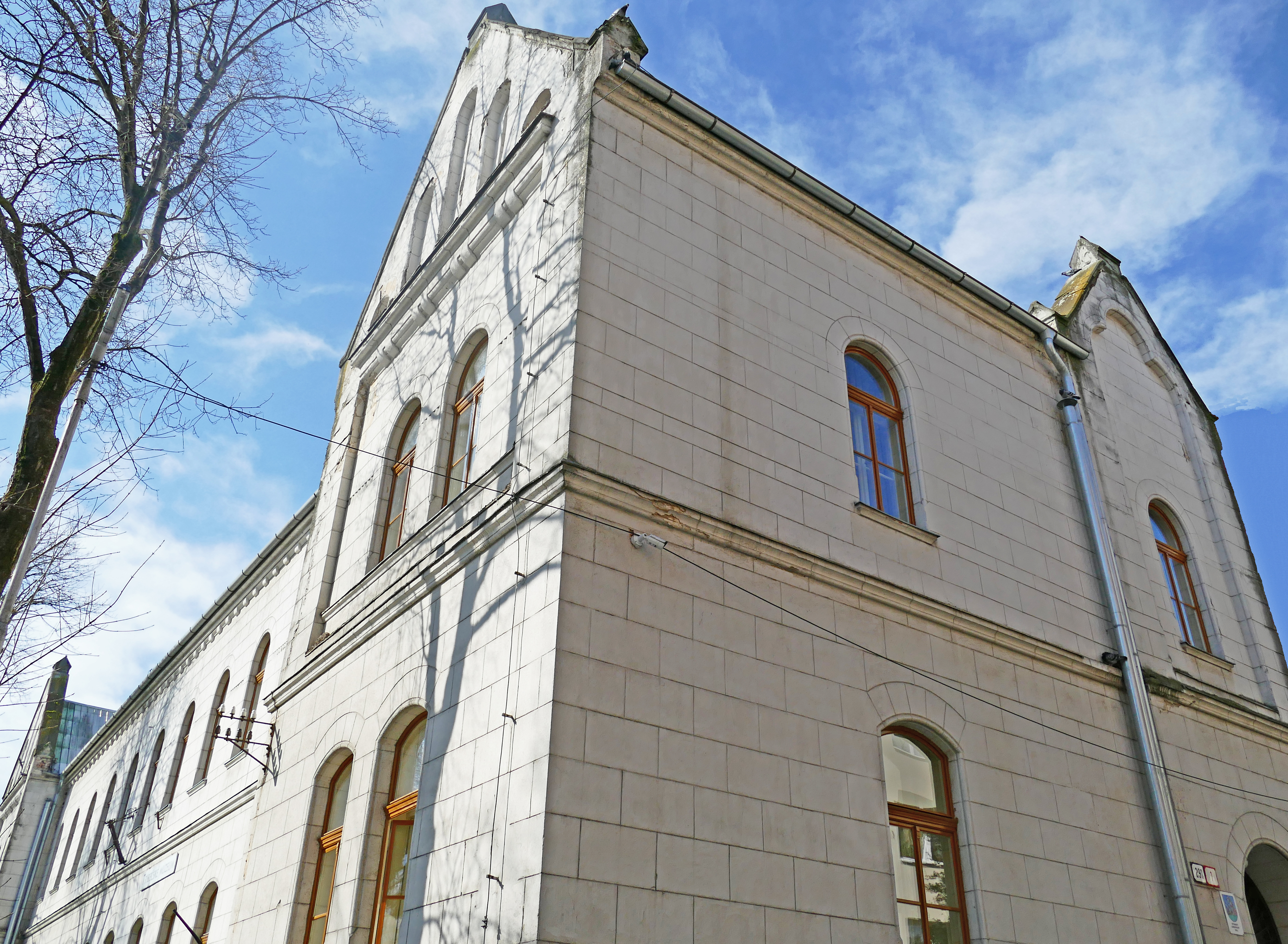 Tribečské múzeum v Topoľčanoch